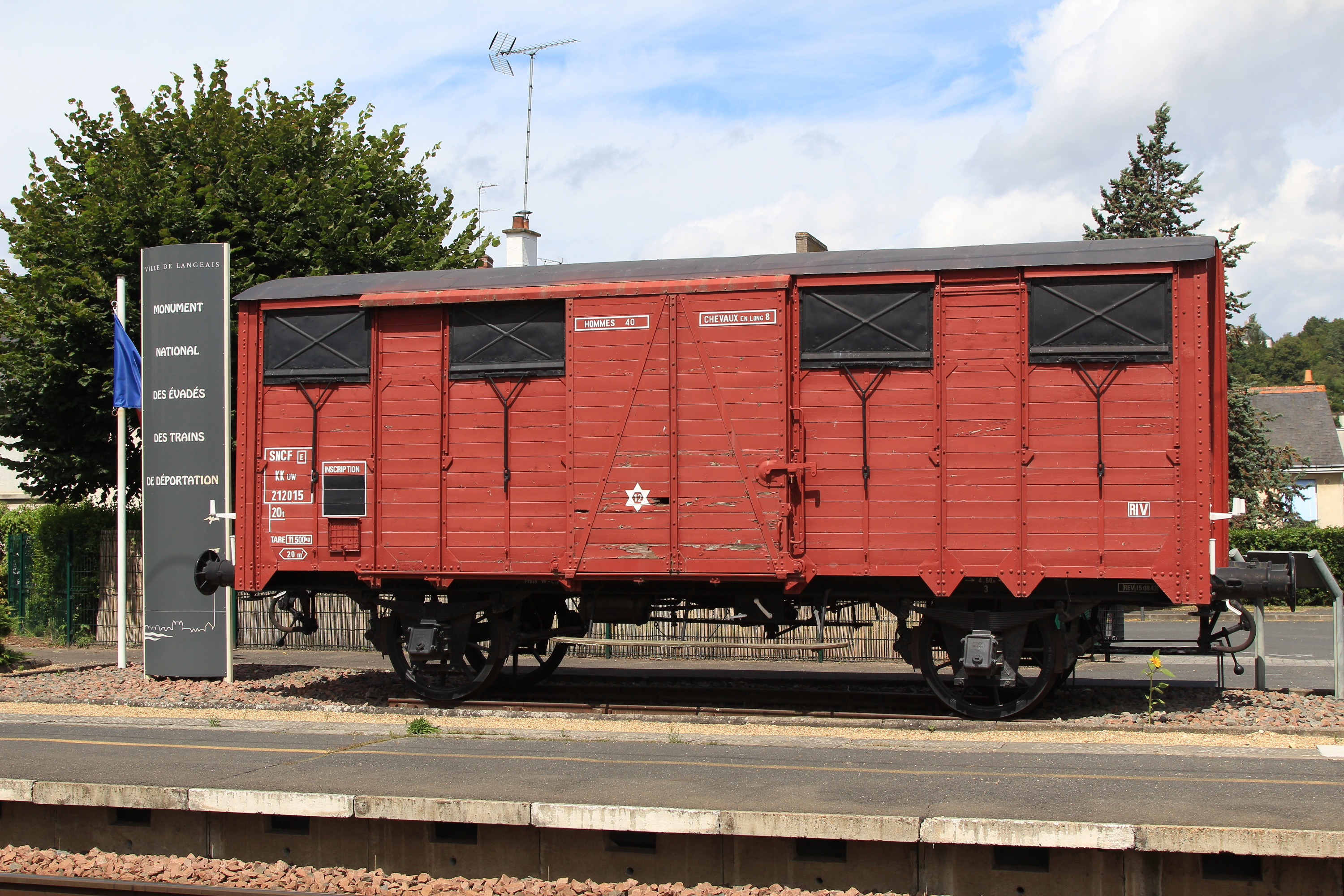 Wagon en gare de Langeais rendant hommage aux évadés des trains de déportations.